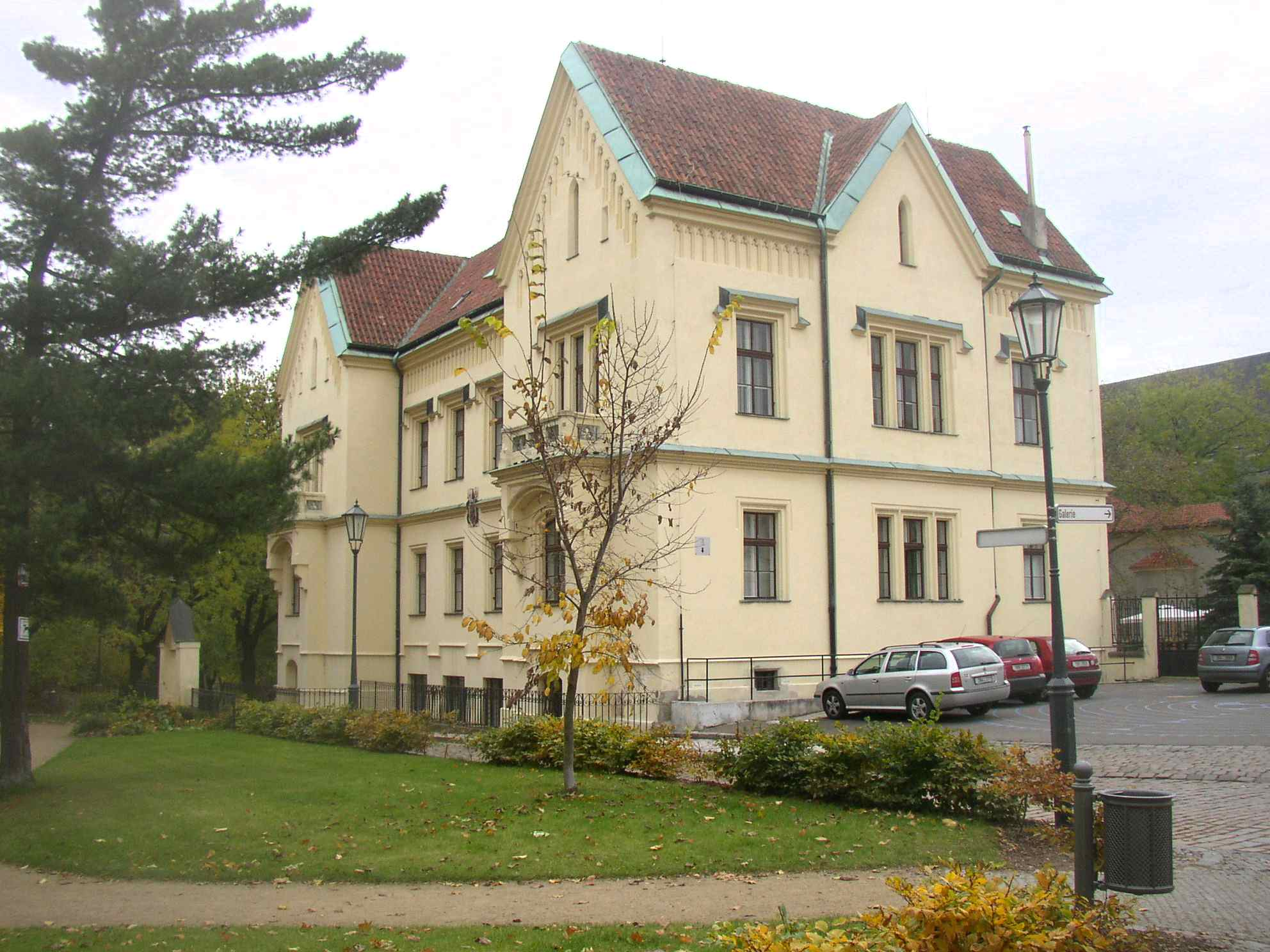 New Provost's Residence in Vyšehrad, Prague, Czech Republic. Designed by Josef Niklas, completed in 1874. Nové proboštství na pražském Vyšehradě, dokončené podle plánů Josefa Niklase roku 1874. Photo taken by Miaow Miaow in October 2005, PD-self